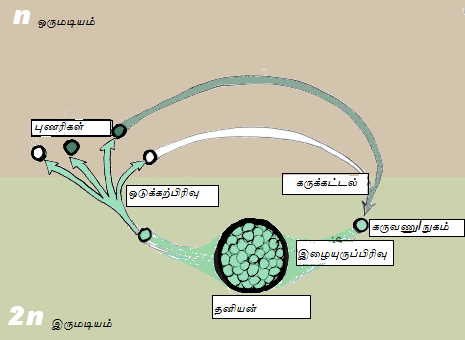 இருமடிய வாழ்க்கை வட்டம்